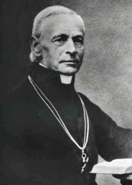 Jakob Laurenz Studach, katholischer Bischof aus der Schweiz, Apostolischer Vikar von Schweden